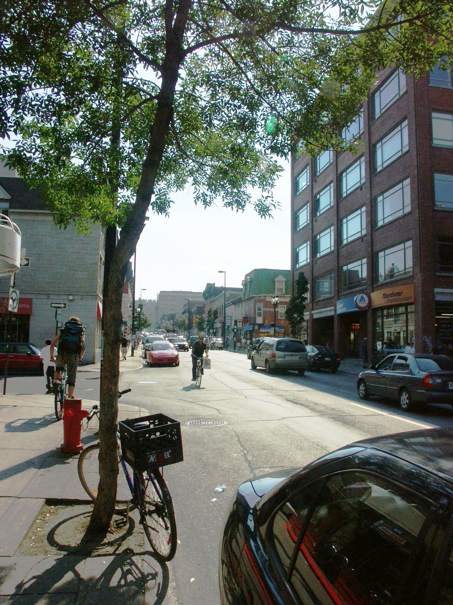 Avenue Mont-Royal, Montréal